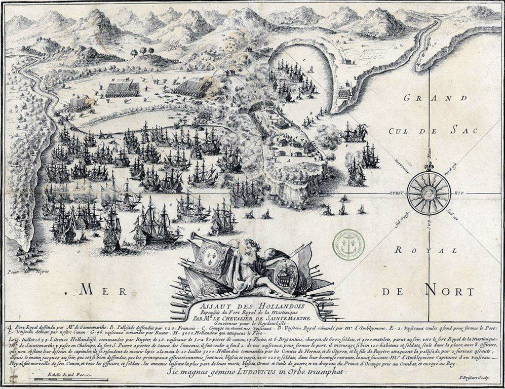 Assaut des Hollandais repoussés du Fort Royal de la Martinique par Mr le Chevalier de Sainte Marthe en 1674, gravure de Pierre Brissart